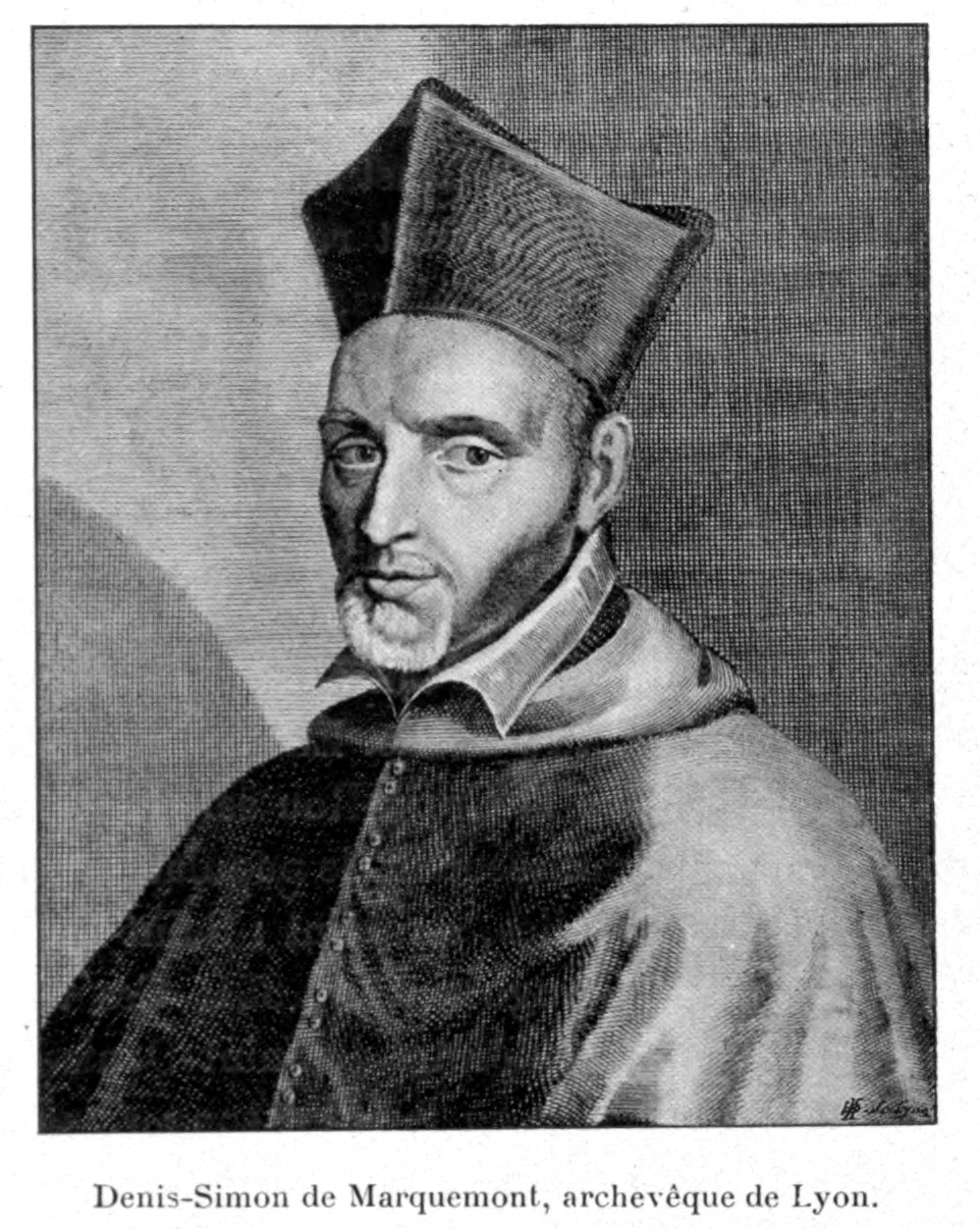 Illustrations pour l'Histoire des églises et chapelles de Lyon